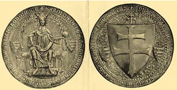 Karel Robert z Anjou